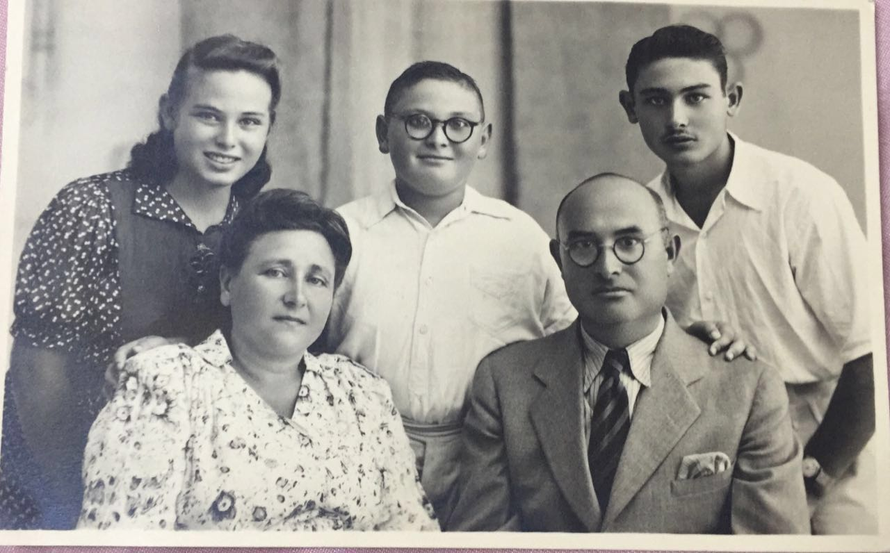 תמונה משפחתית